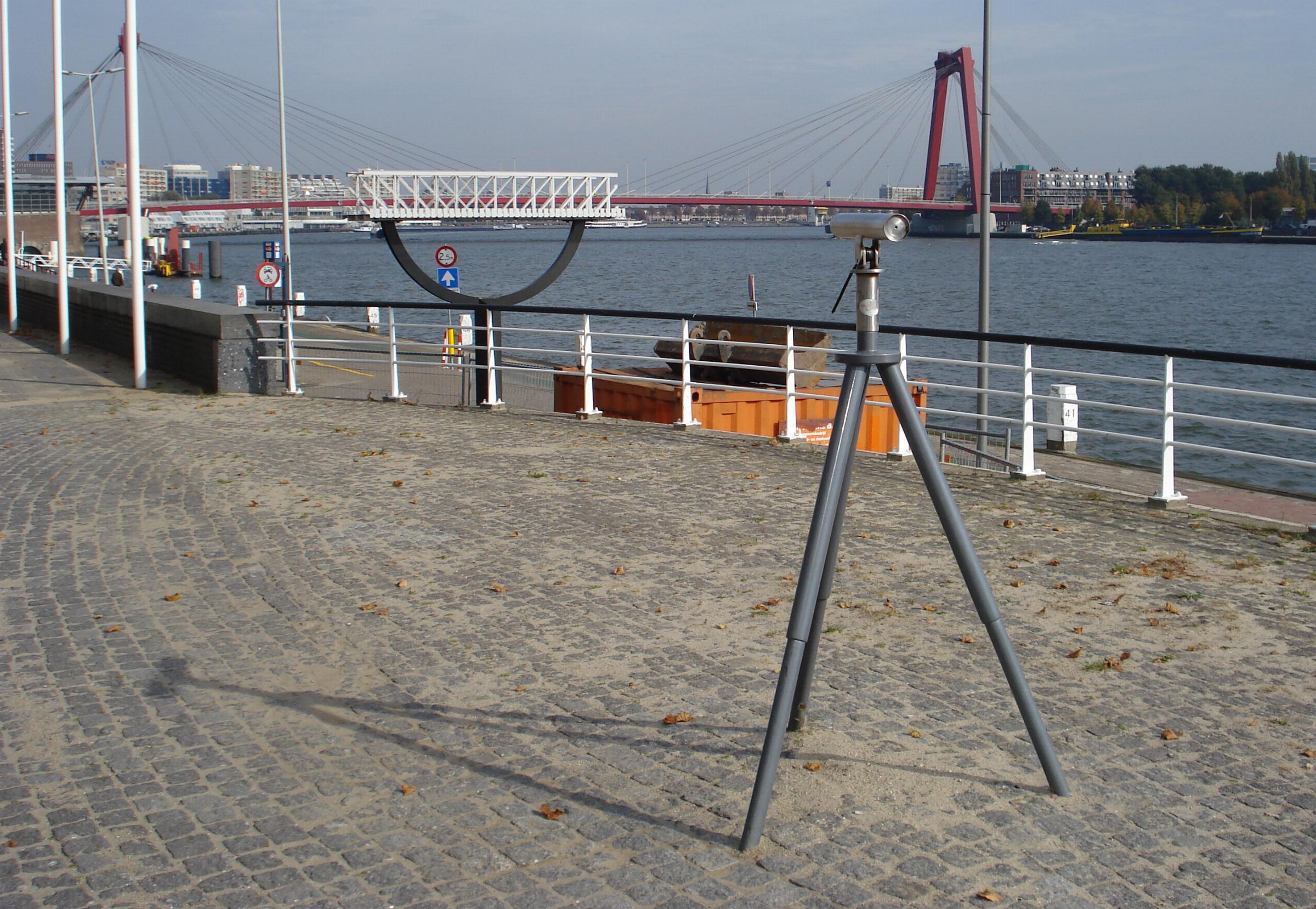 Rotterdam, Boompjes. Kunstwerk: verrekijker en maquette oude maasbrug door "Kunst en Vaarwerk". Rotterdam/The Netherlands.